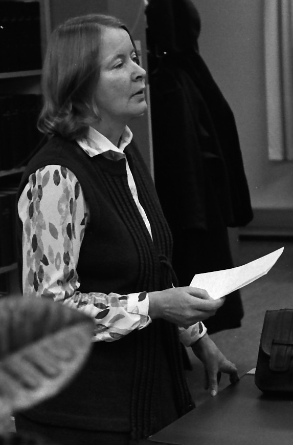 Eeva Tikka Kuusankosken työväenopiston kirjallisuuspiirissä 17.10.1981